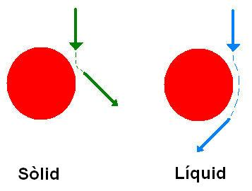 Explicació gràfica de l'Efecte Coandă